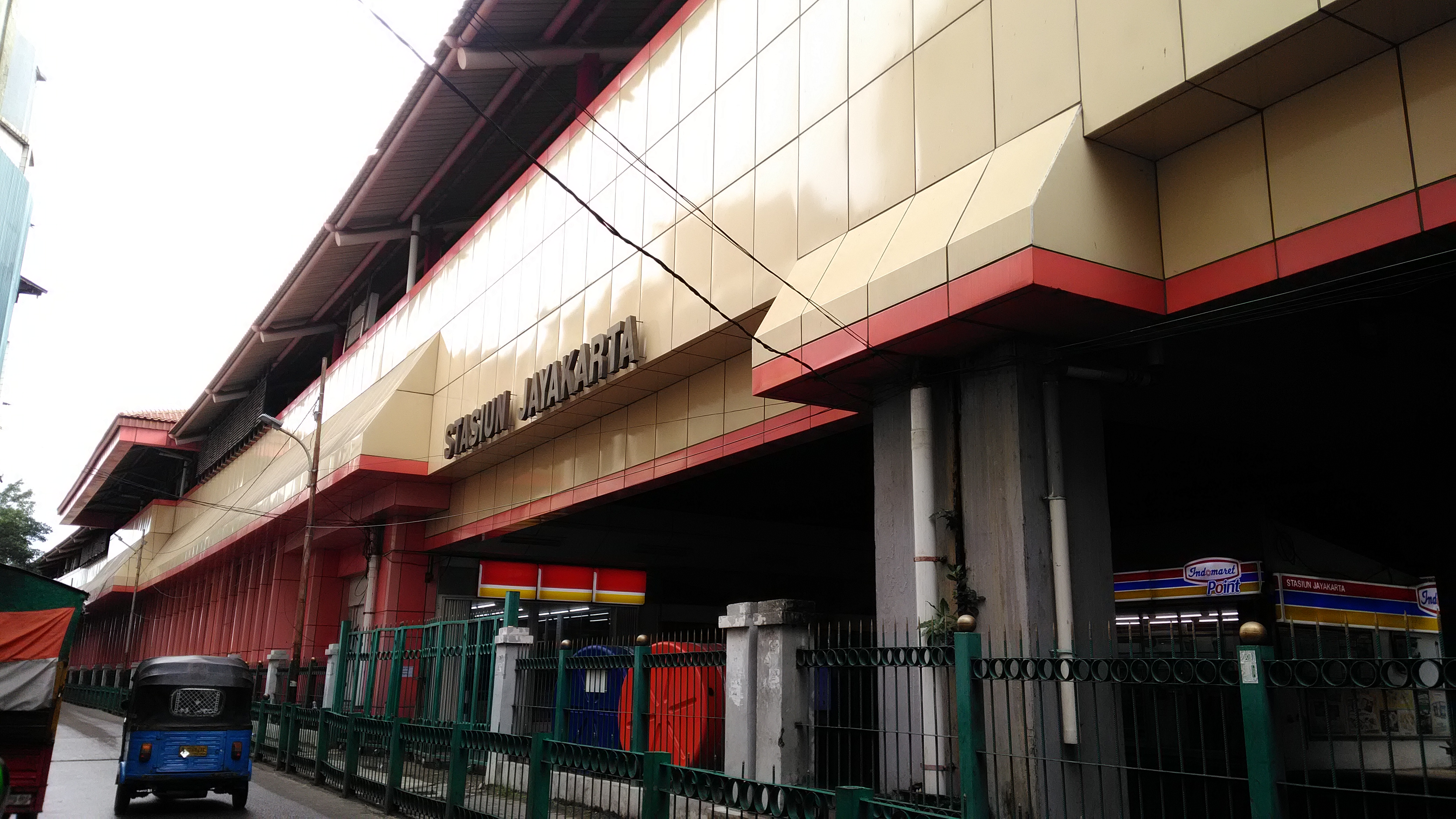 Sunda: Stasion Jayakarta, 2020